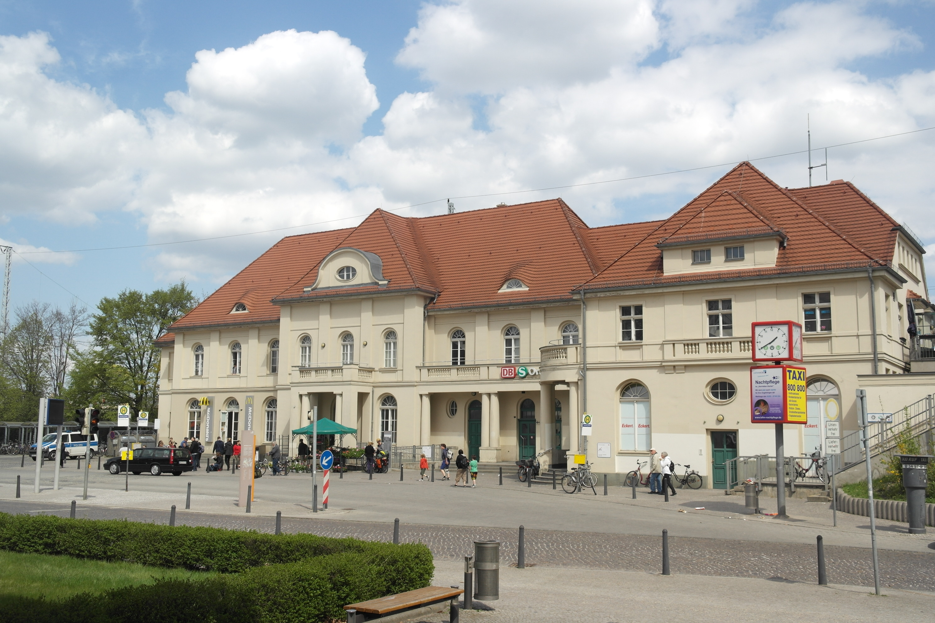 Bahnhof Oranienburg, denkmalgeschütztes Empfangsgebäude, Straßenseite